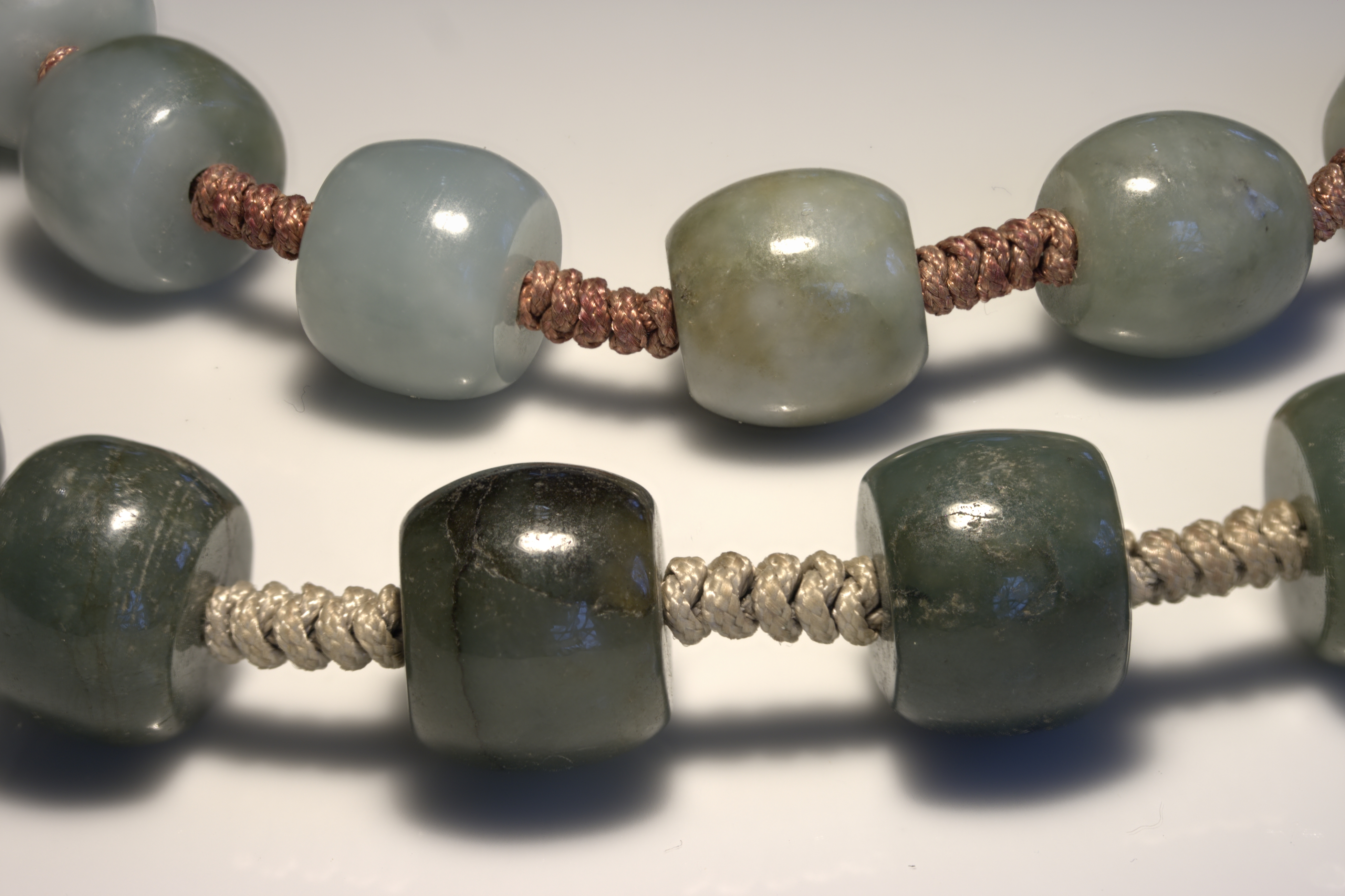 Jade Ketten